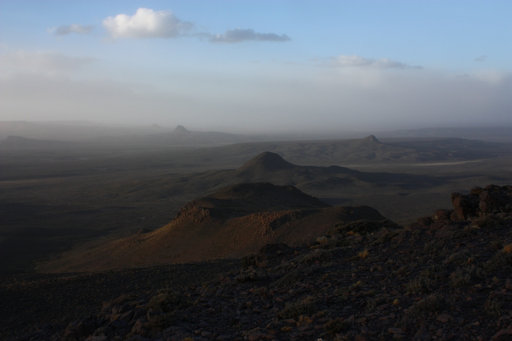 Vista de la Meseta de Somuncurá.